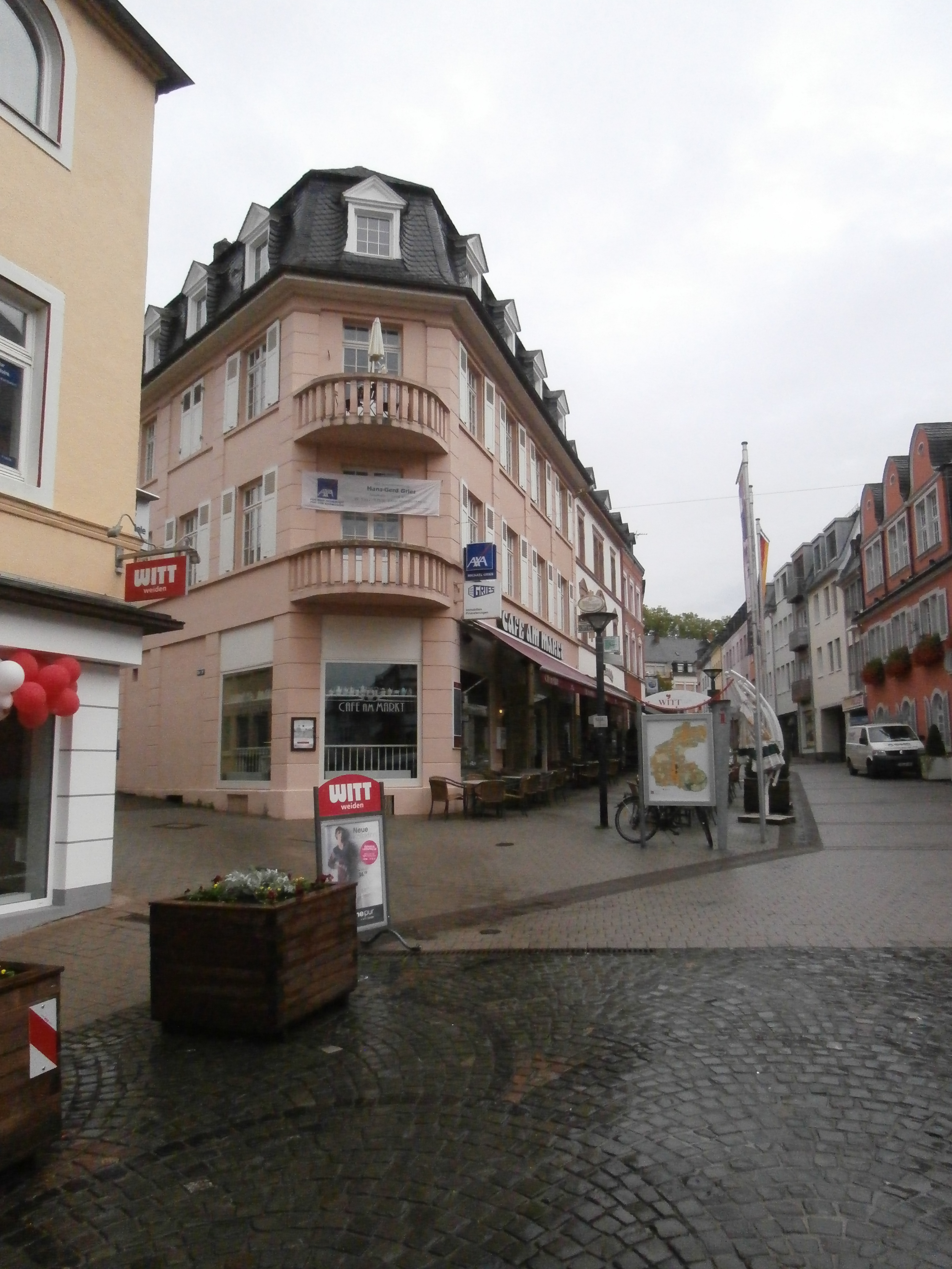 Wittlich Neustr. 1 dreigeschossiger barockisierender Mansarddachbau